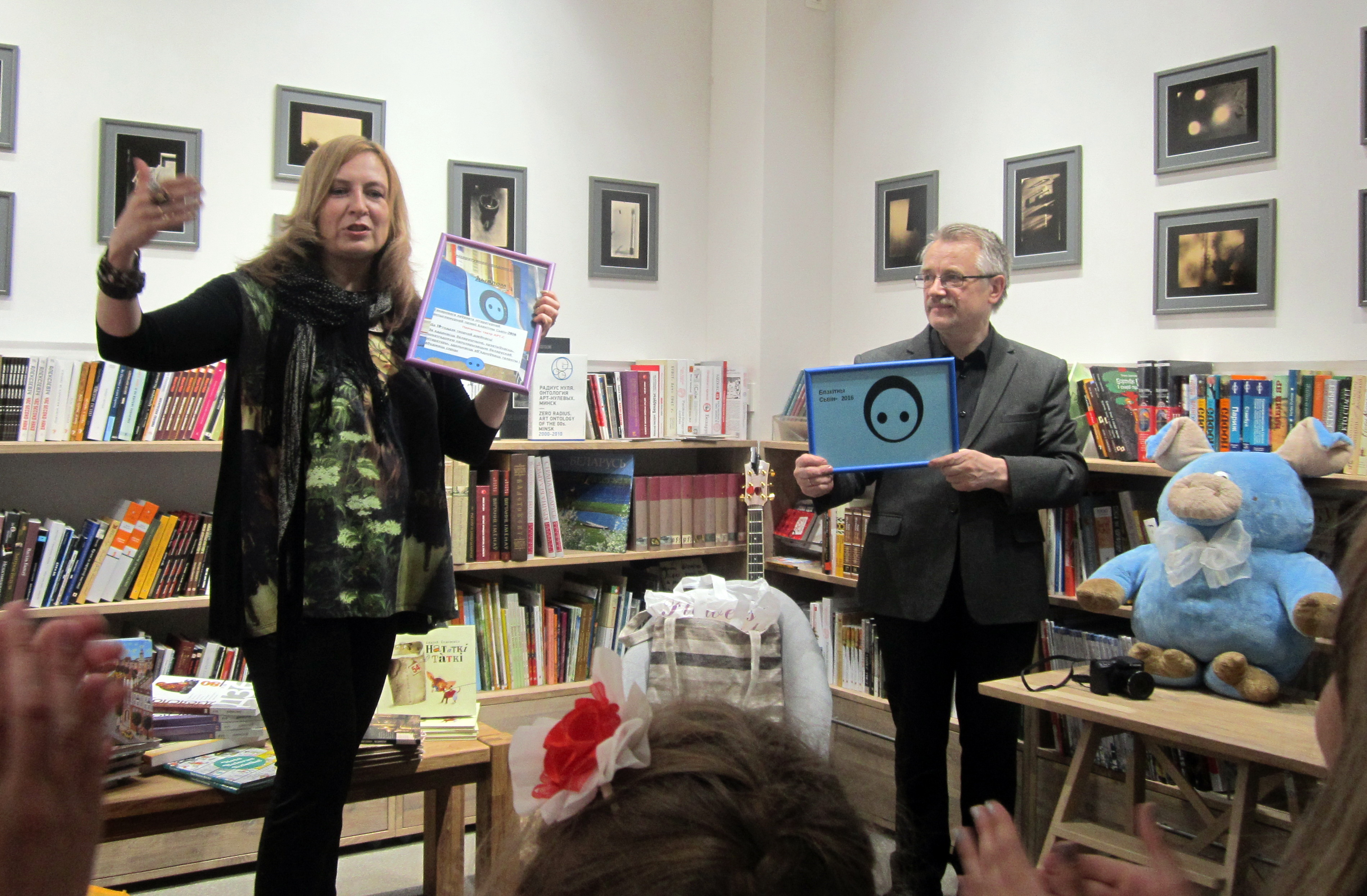 Узнагароджанне лаўрэатаў на "Блакітны Свін - 2016". Людміла Рублеўская і Віктар Шніп.